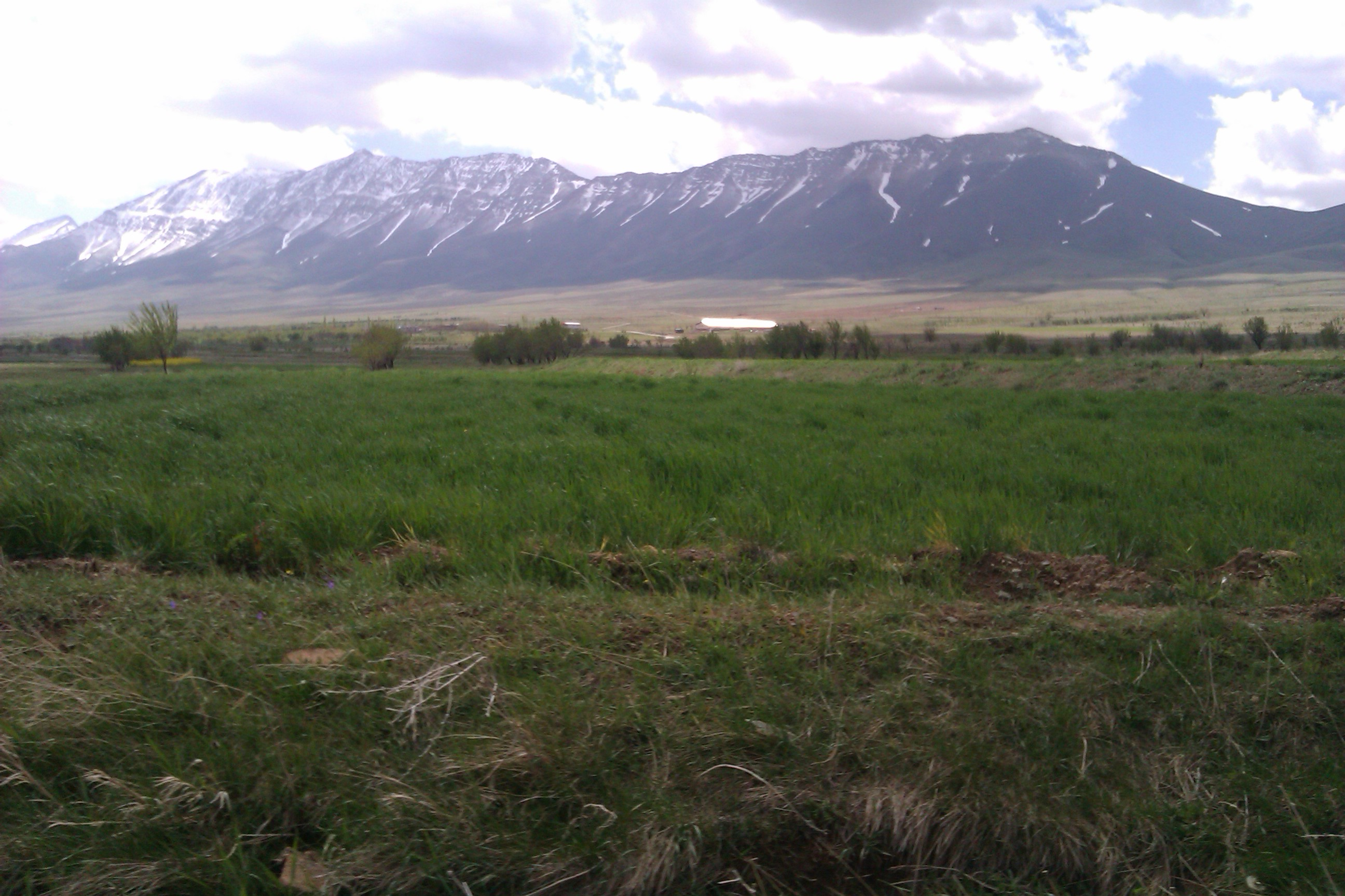 رشته کوههای کمر بسته روستای فرج آباد